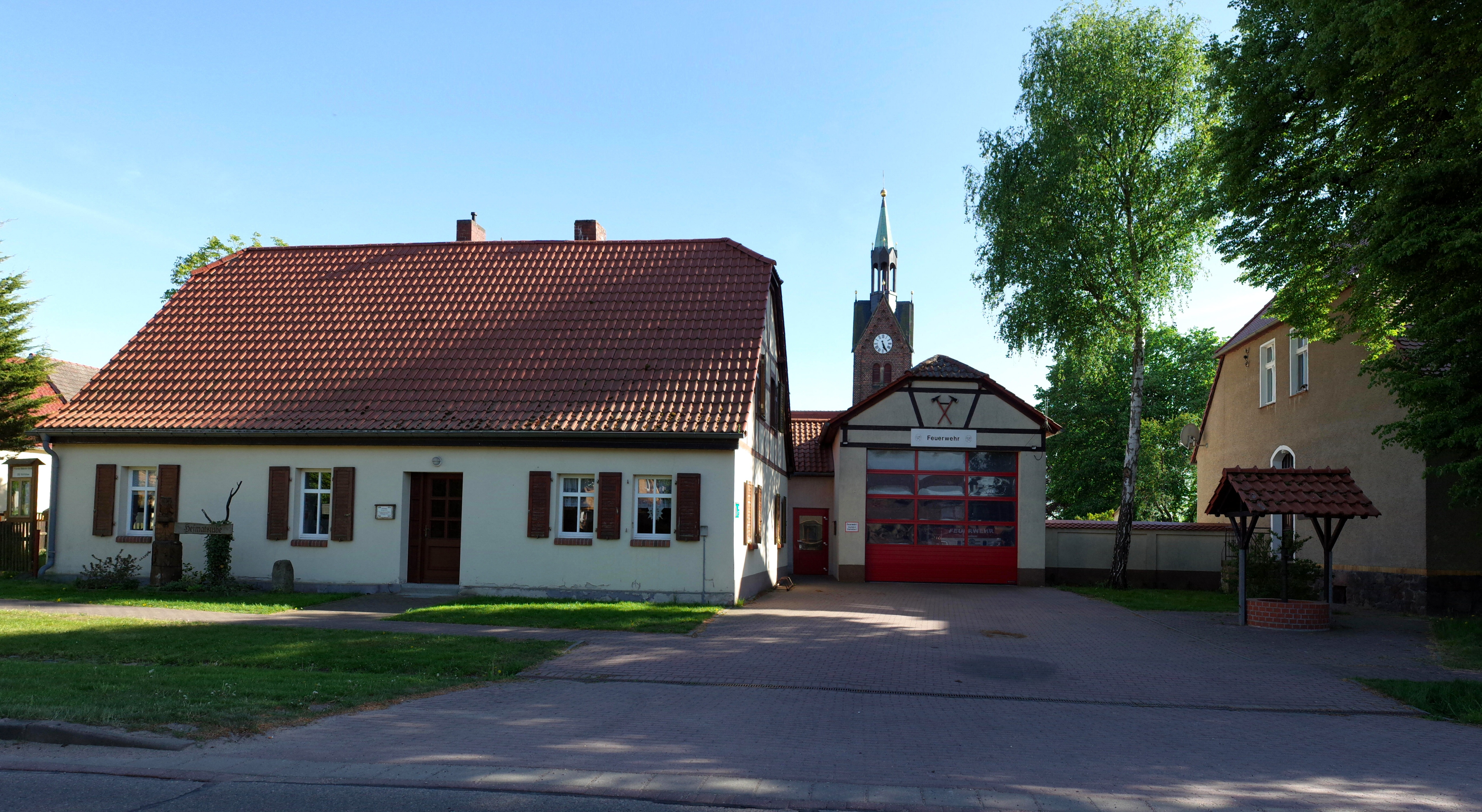 Bad Schmiedeberg, Ortsteil Söllichau. Die Heimatstube vom Heimatverein Söllichau e.V[1], Romanische Dorfkirche, Freiwillige Feuerwehr und Brunnen am Pfarrhaus.